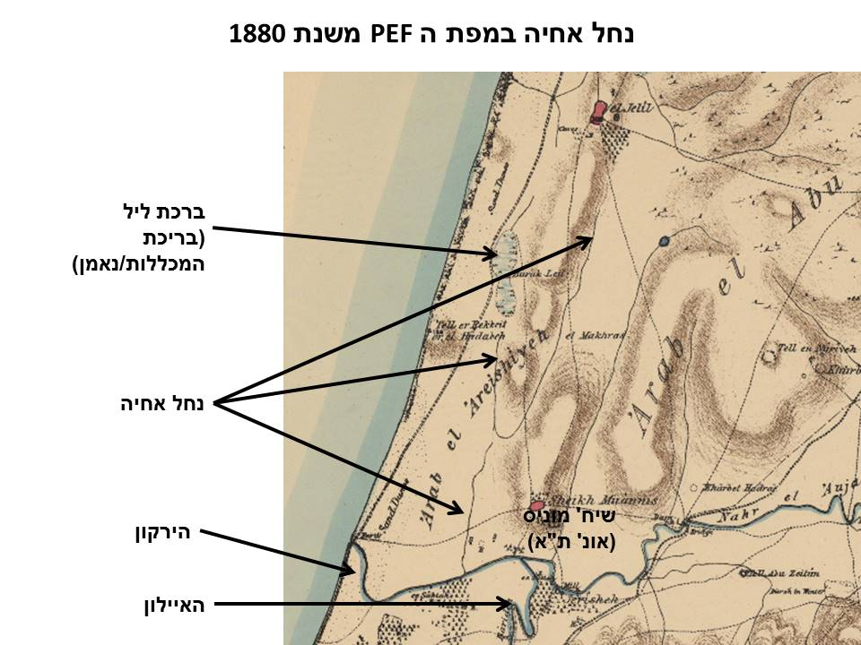 אקטע ממפת ה PEF משנת 1880 המתאר את אזור נחל אחיה